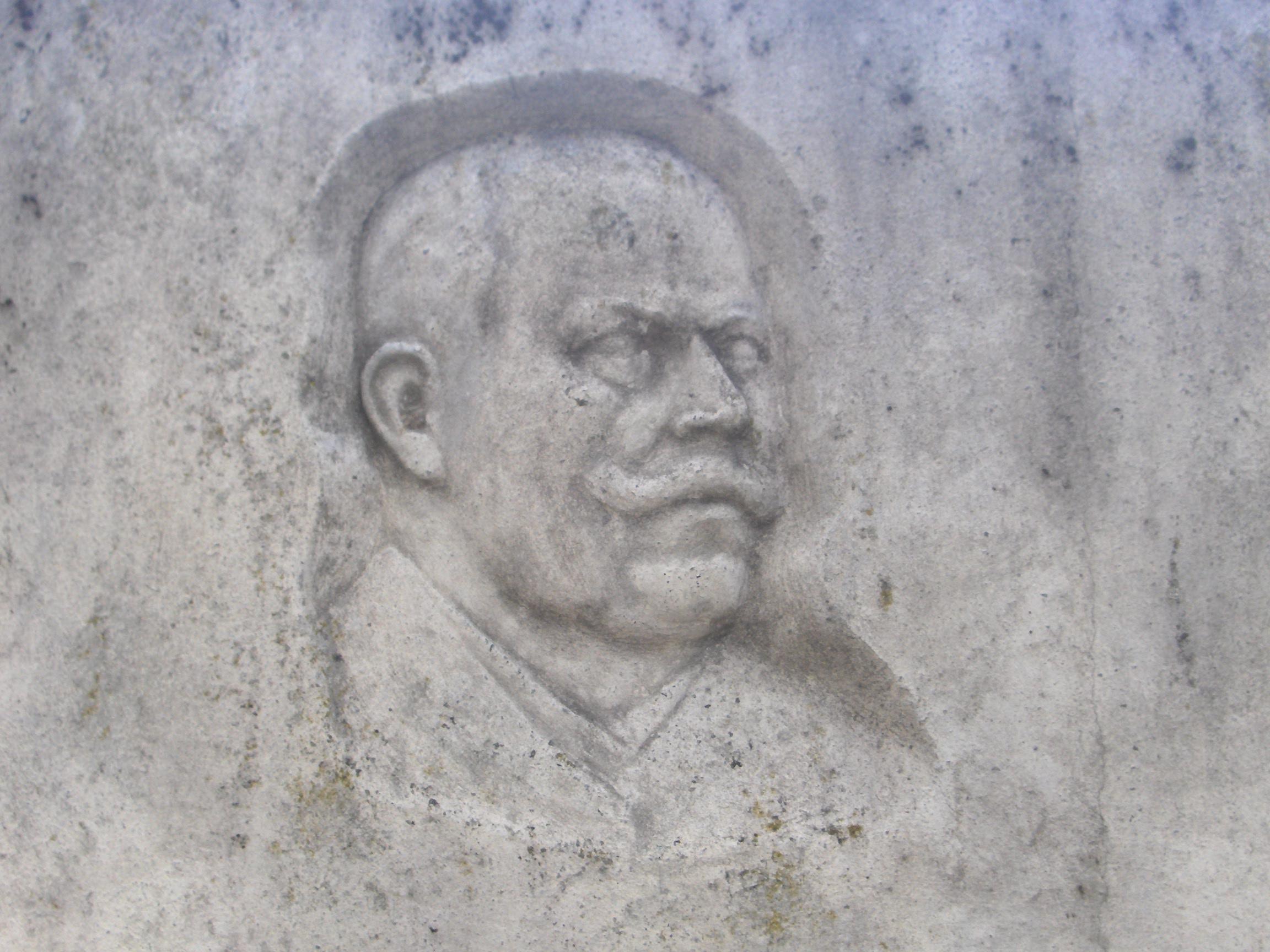 Pomnik Friedricha Loefflera na terenie Techno- und Gewerbe Center we Frankfurcie nad Odrą